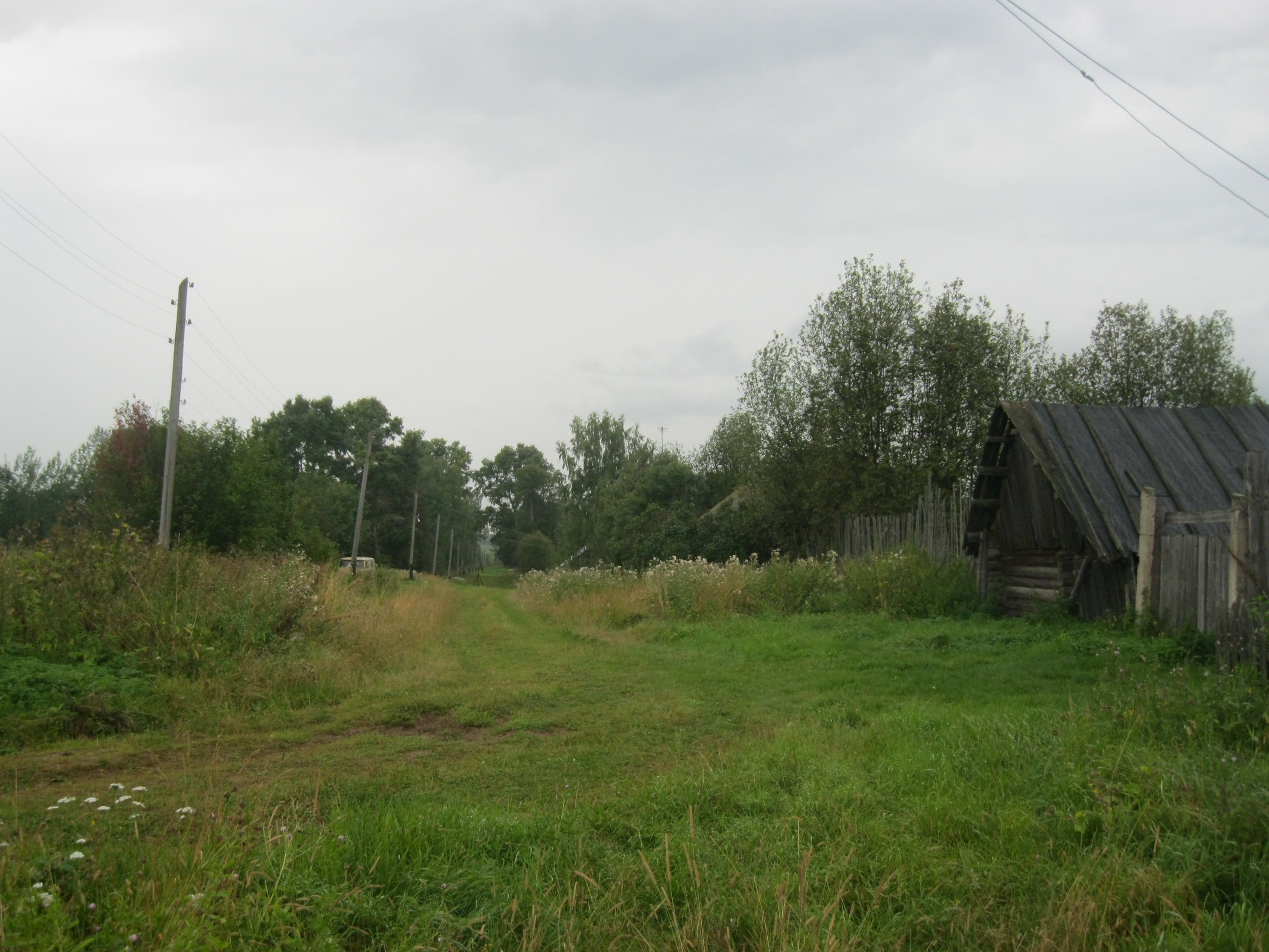 Фото деревни Лумпа